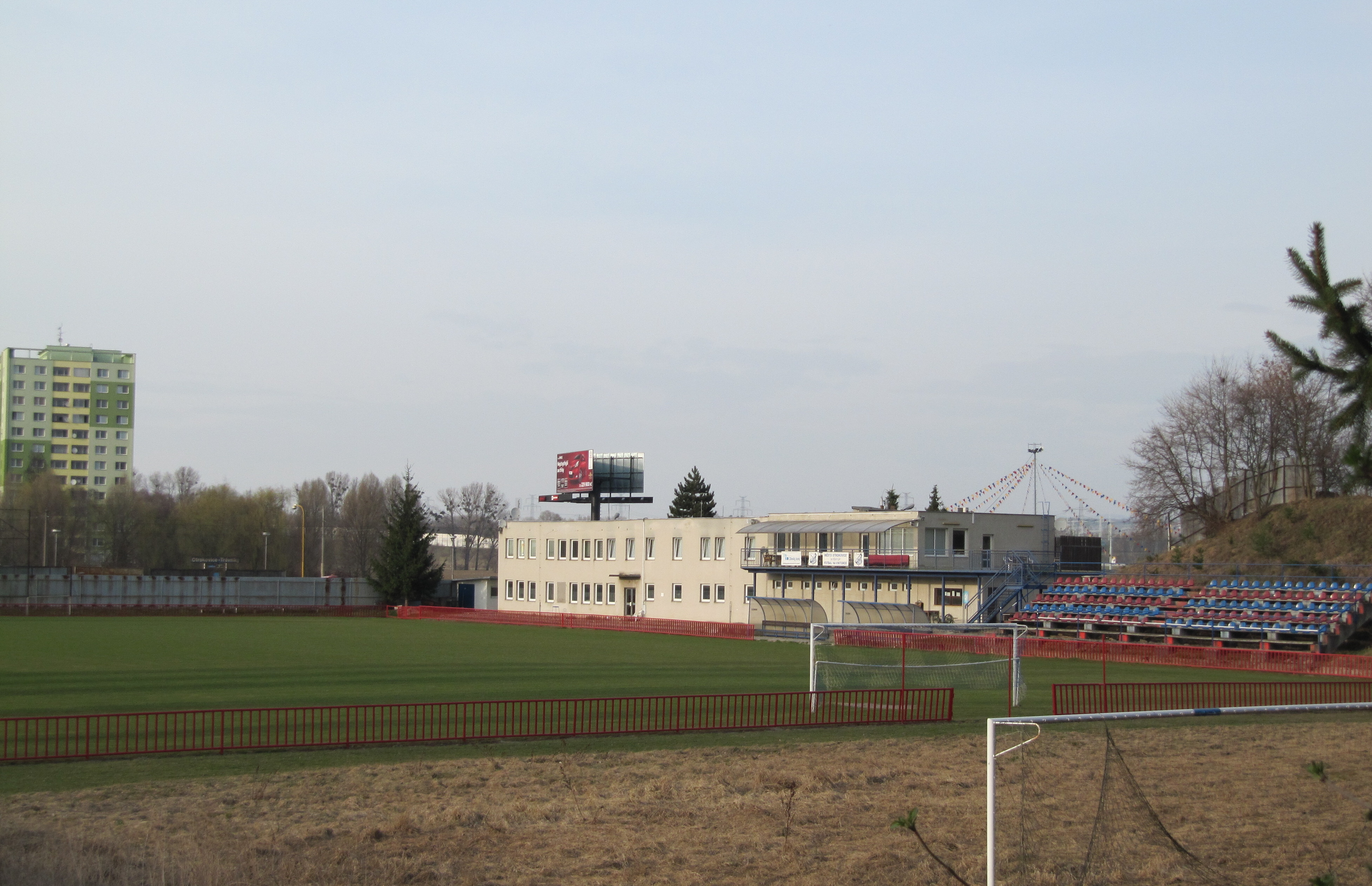 Otrokovice-Kvítkovice, stadion FC Viktoria Otrokovice, Zlínská 240.